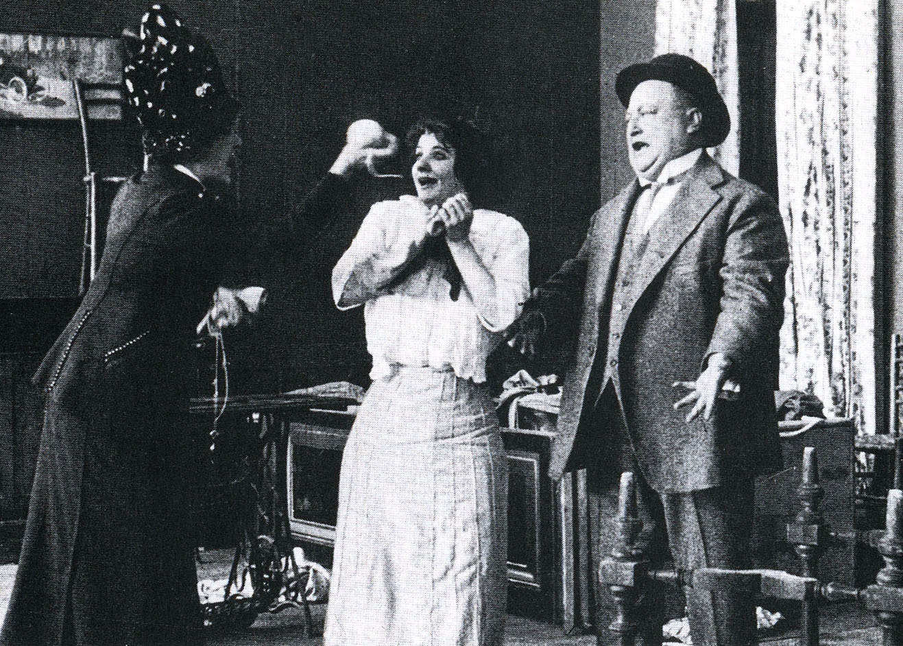 Il gomitolo foto dal set